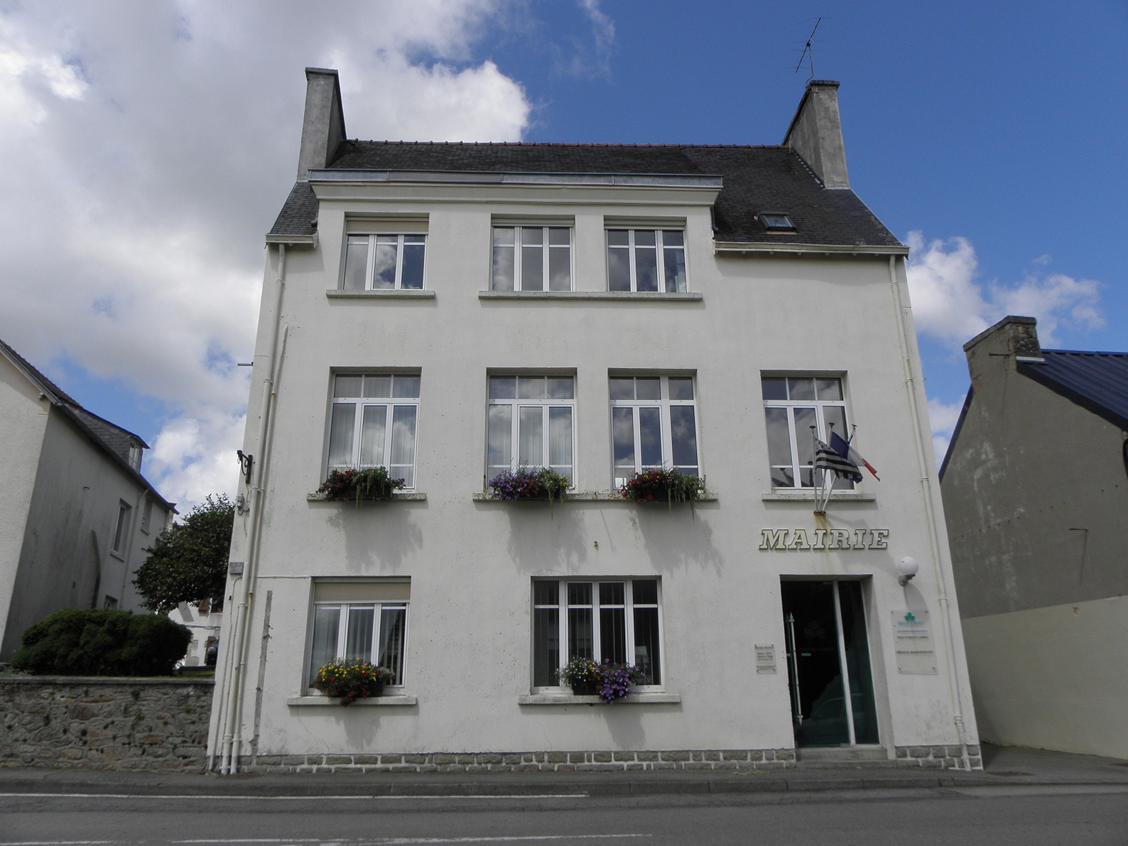 Mairie d'Ergué-Gabéric (29).